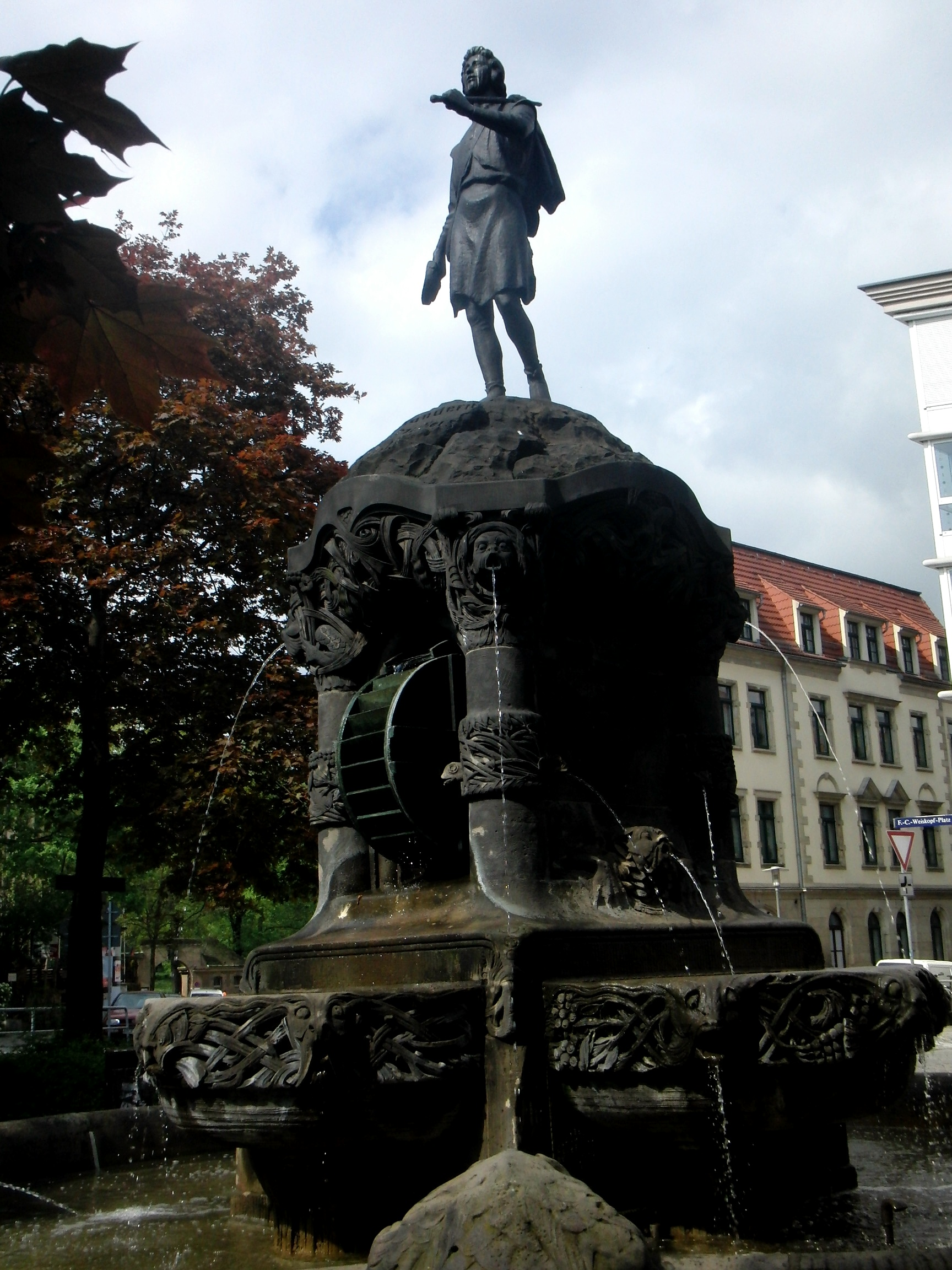 Der Müllerbrunnen wurde 1902 eingeweiht und soll an Plauens Tradition als Mühlenstandort und zugleich an den zeitweise hier lebenden Dichter Wilhelm Müller erinnern (erste Zeilen seines Textes „Das Wandern ist des Müllers Lust“ am Sockel des Brunnens eingemeißelt); Brunnenfigur von Robert Henze, Unterbau von Lossow & Viehweger, Figur 1943 eingeschmolzen und erst 1986 von Wilhelm Landgraf nach Vorlagen von Ansichtskarten rekonstruiert